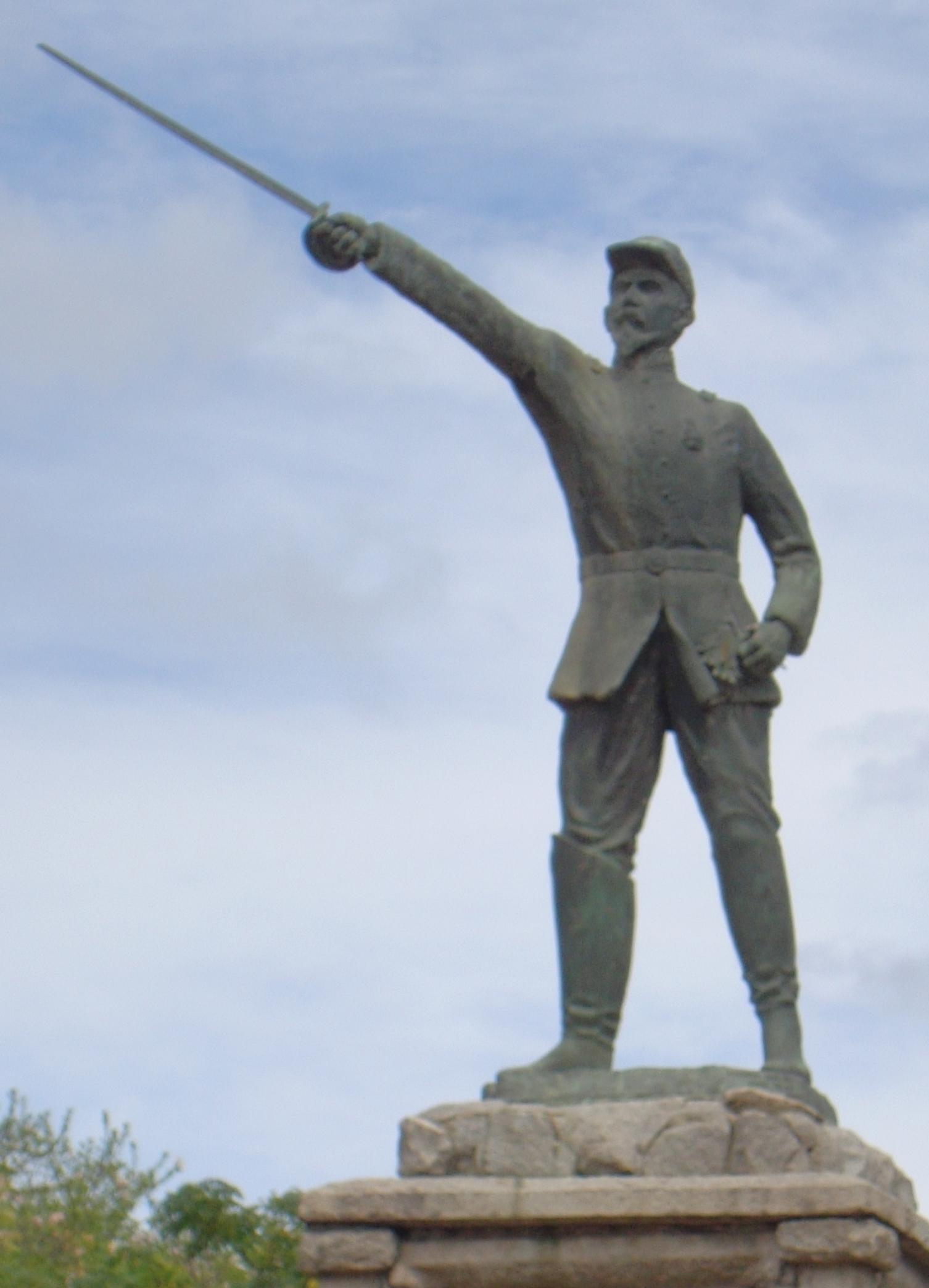 Monumento ao Brigadeiro Sampaio